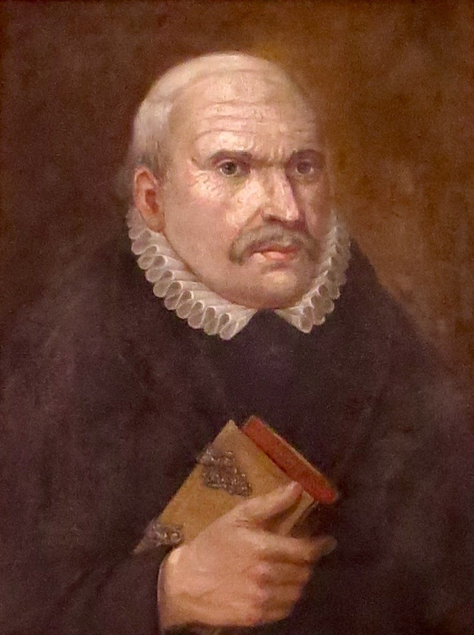 Reformatoren Herman Tast, detalje fra mindetavle i Marienkirche i Husum, Holsten